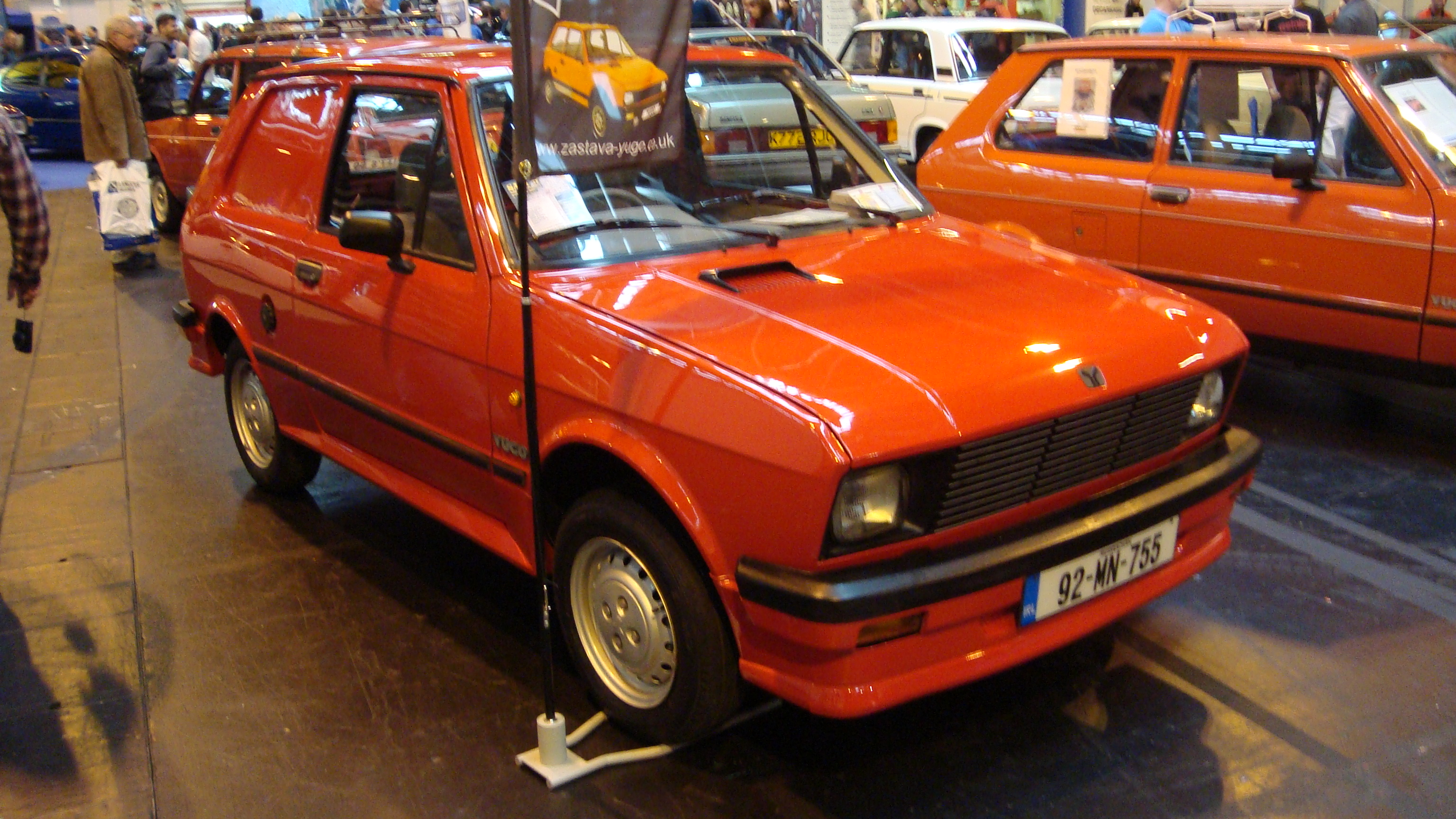 Absolutely mint for a van